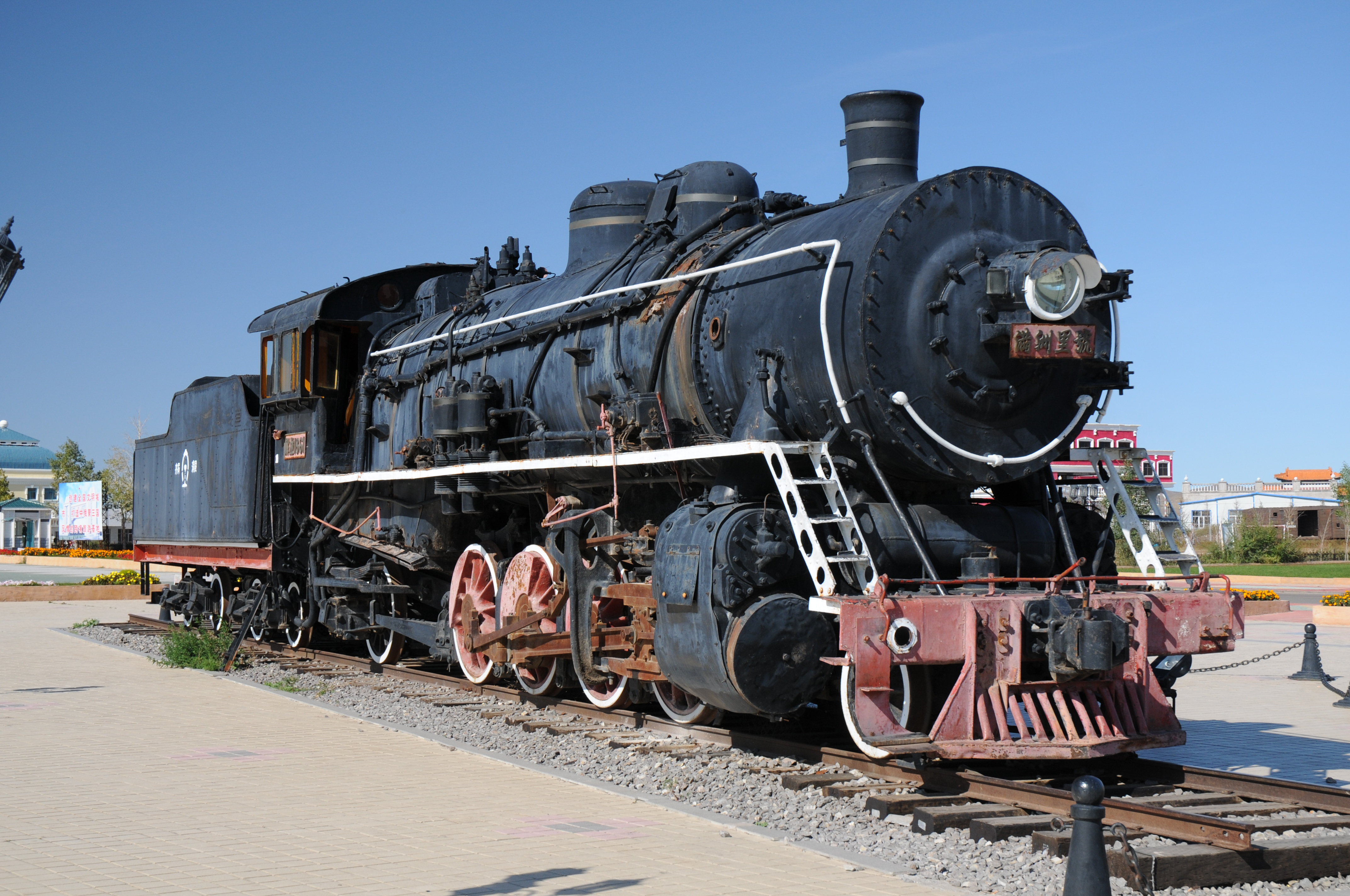 满洲里 火车头广场的蒸汽机车